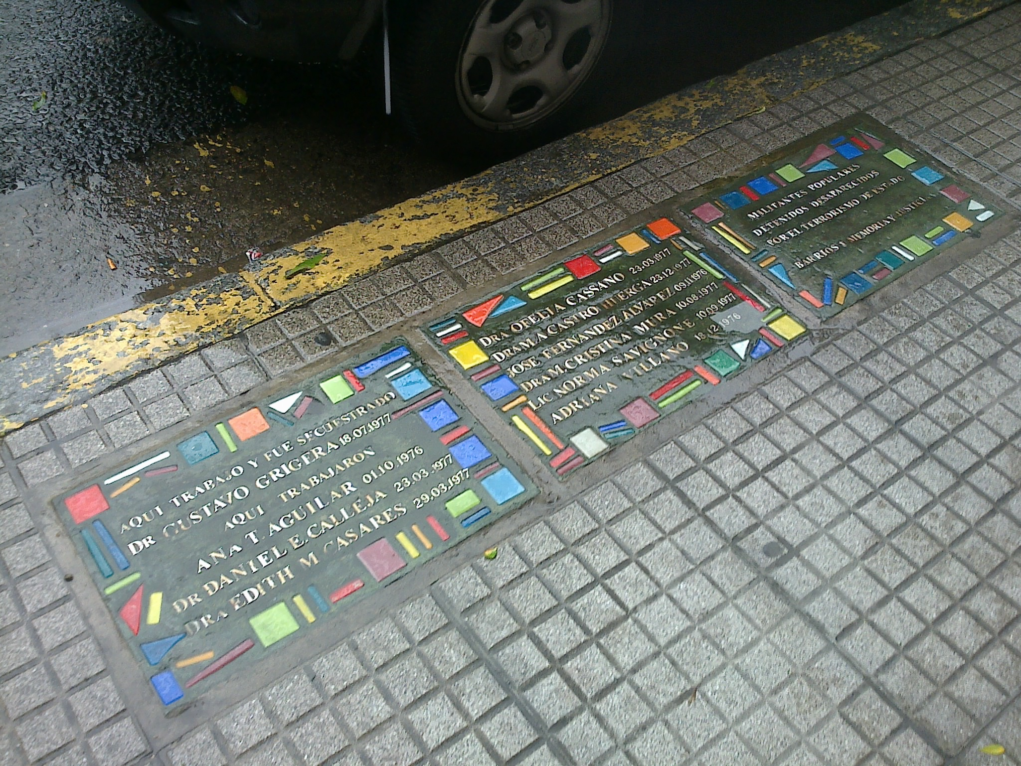 Barrios x Memoria y Justicia/Baldosas colocadas el 18/7/2011 en la vereda del Hospital Italiano, Gascón 450, CABA.